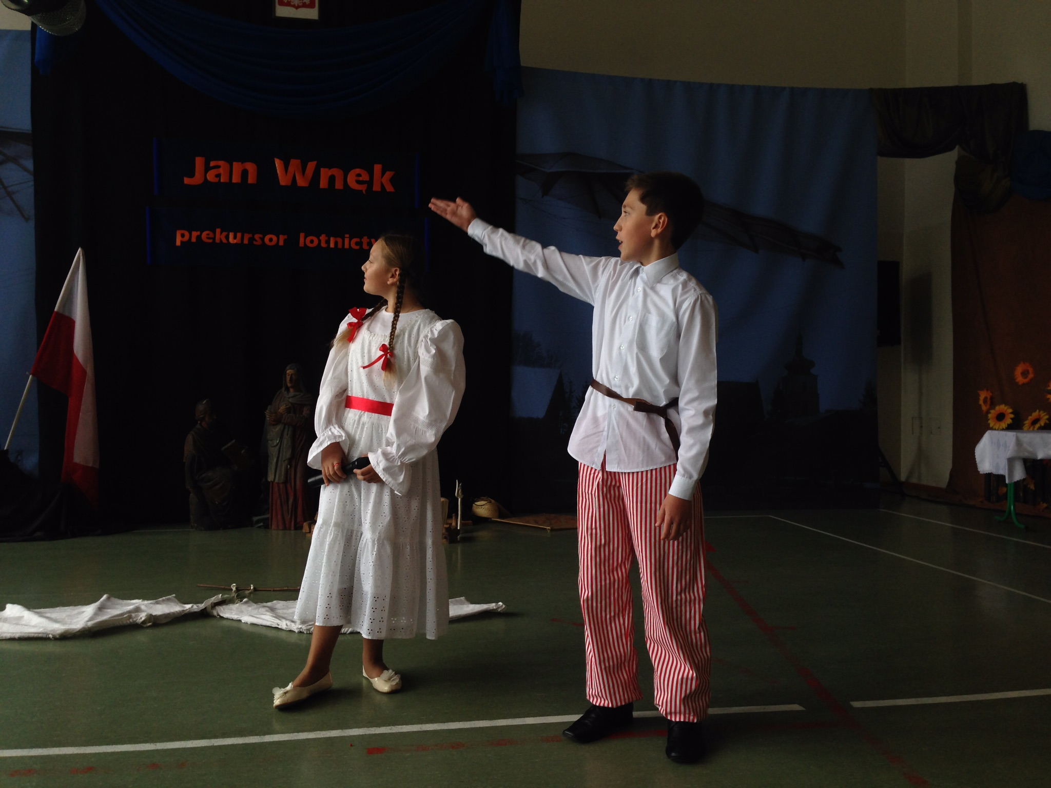 O Janie Wnęku, który ptakom pozazdrościł.